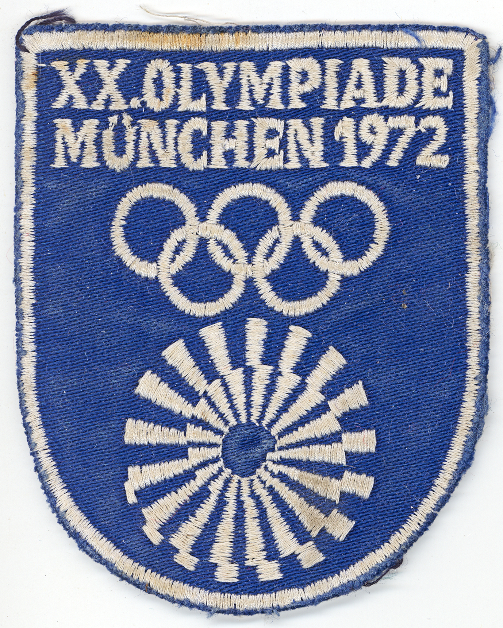 Deutschland, München, XX. Olympische Sommerspiele 1972, Aufnäher